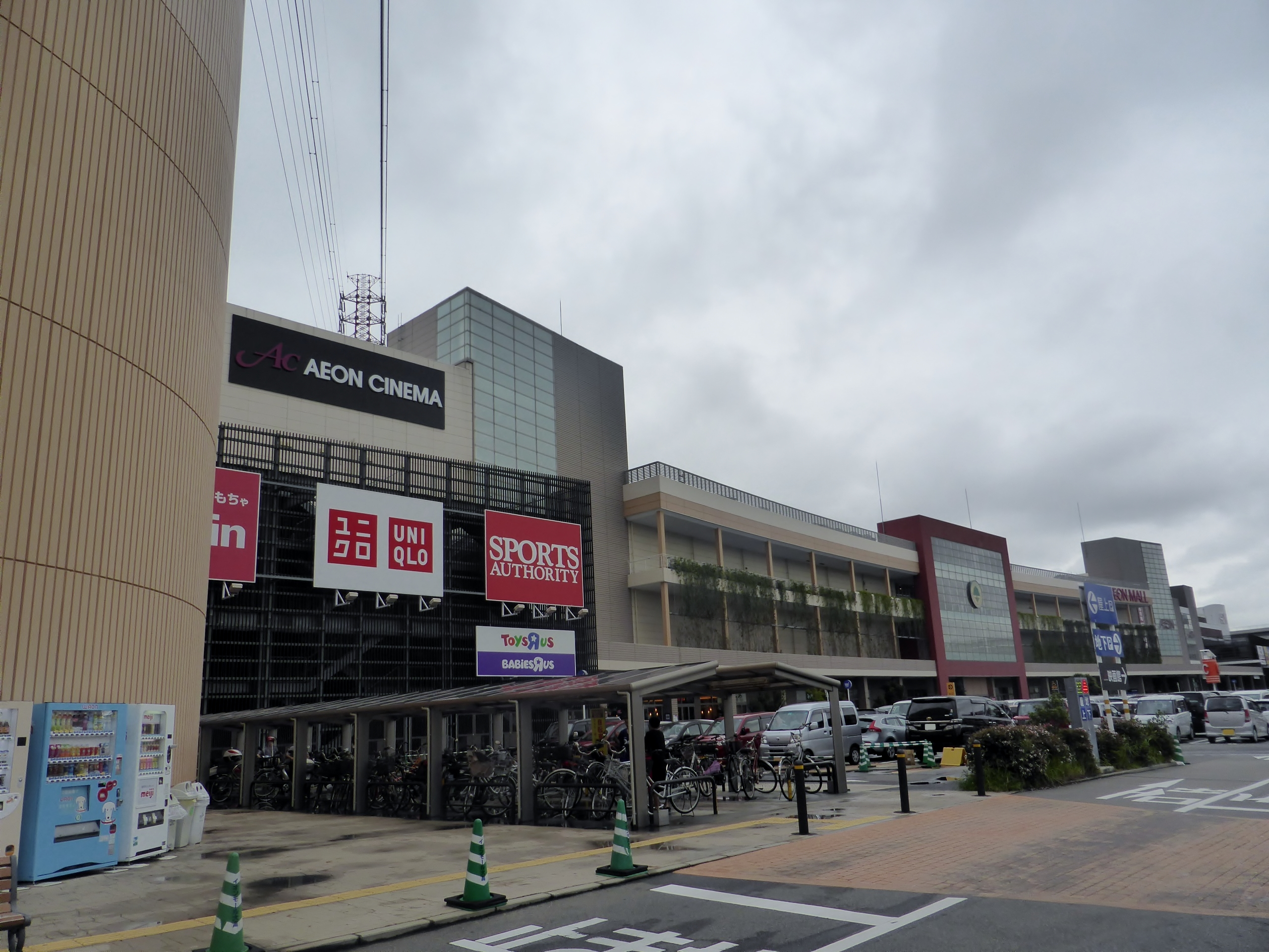 イオンモール大高を撮影。